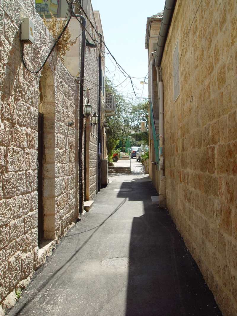 שכונת שערי צדק, סמטה